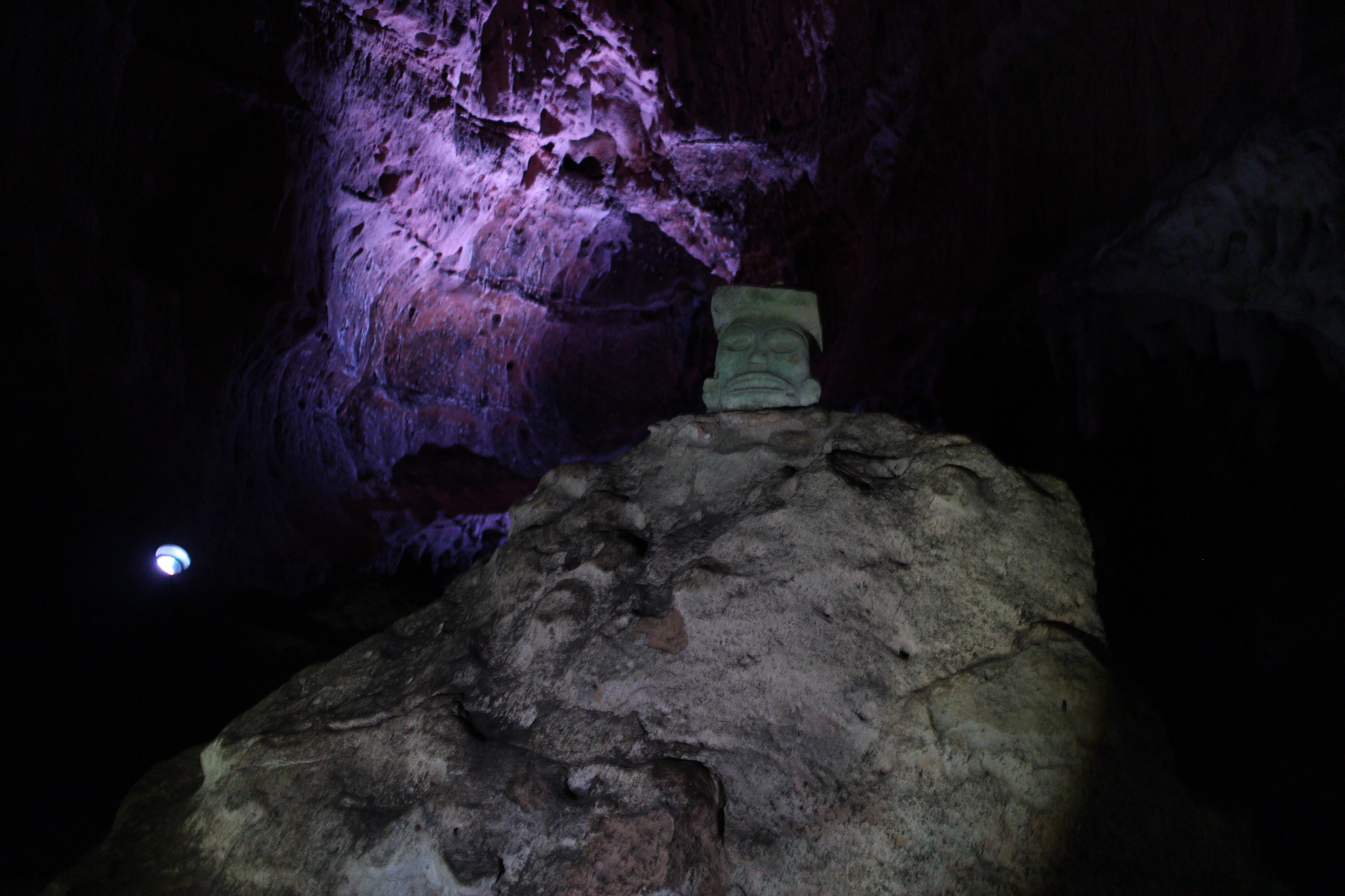 Kultplatz in der Loltún Höhle